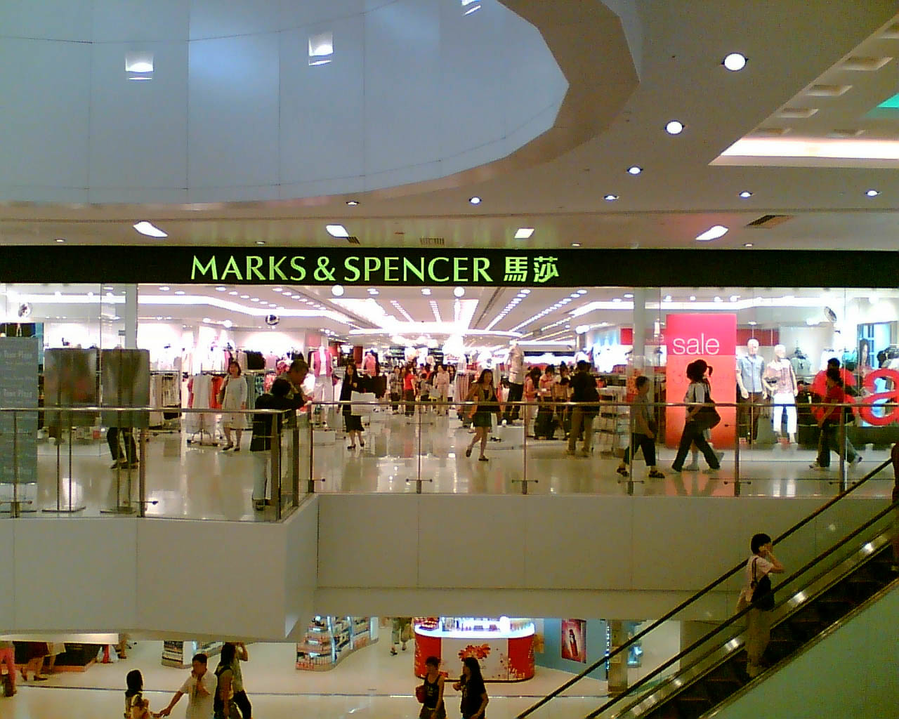 新城市廣場全新裝修的馬莎百貨